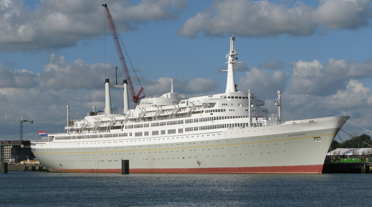 Hotelschip SS Rotterdam in de haven van Rotterdam